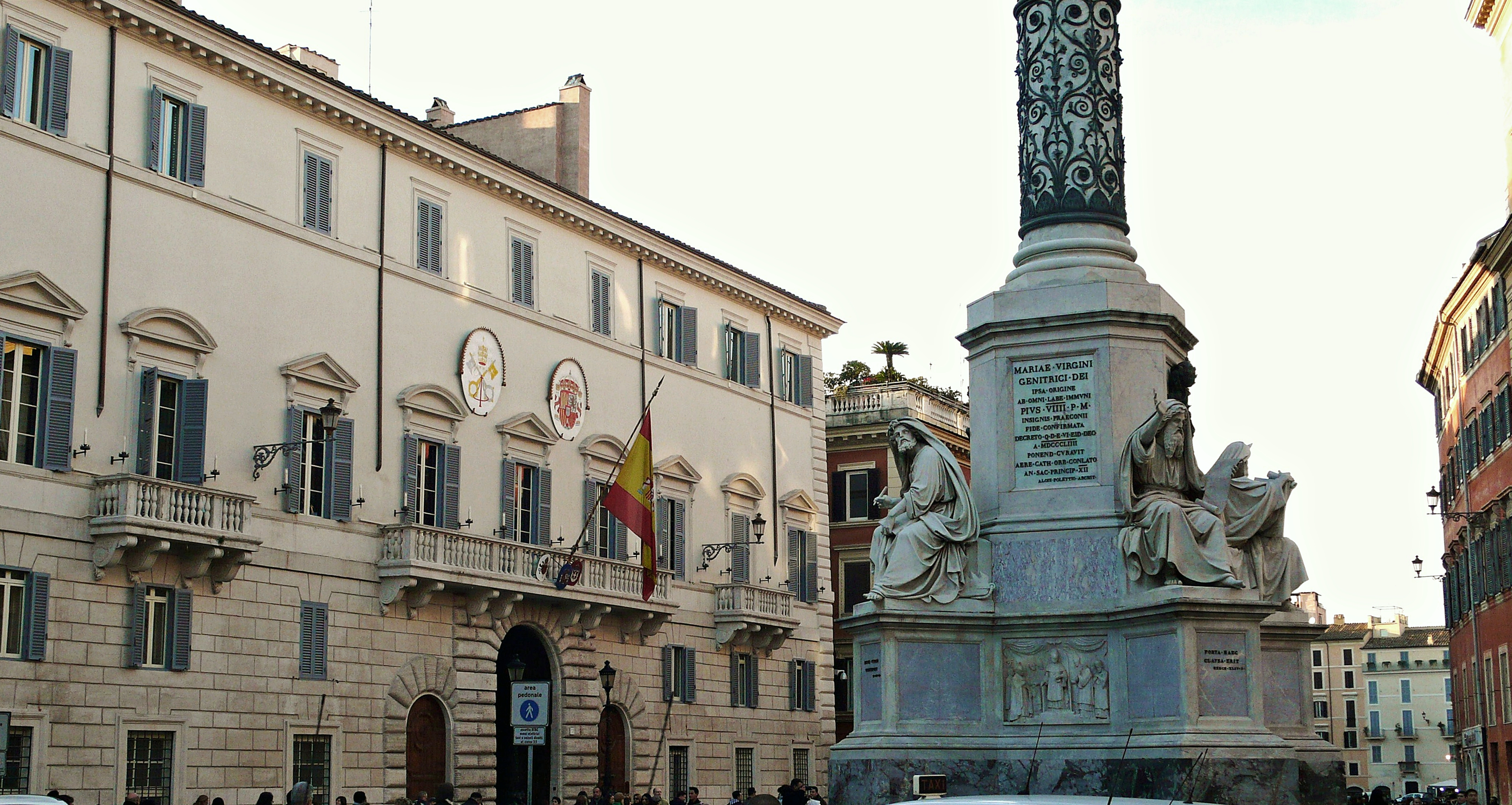 roma